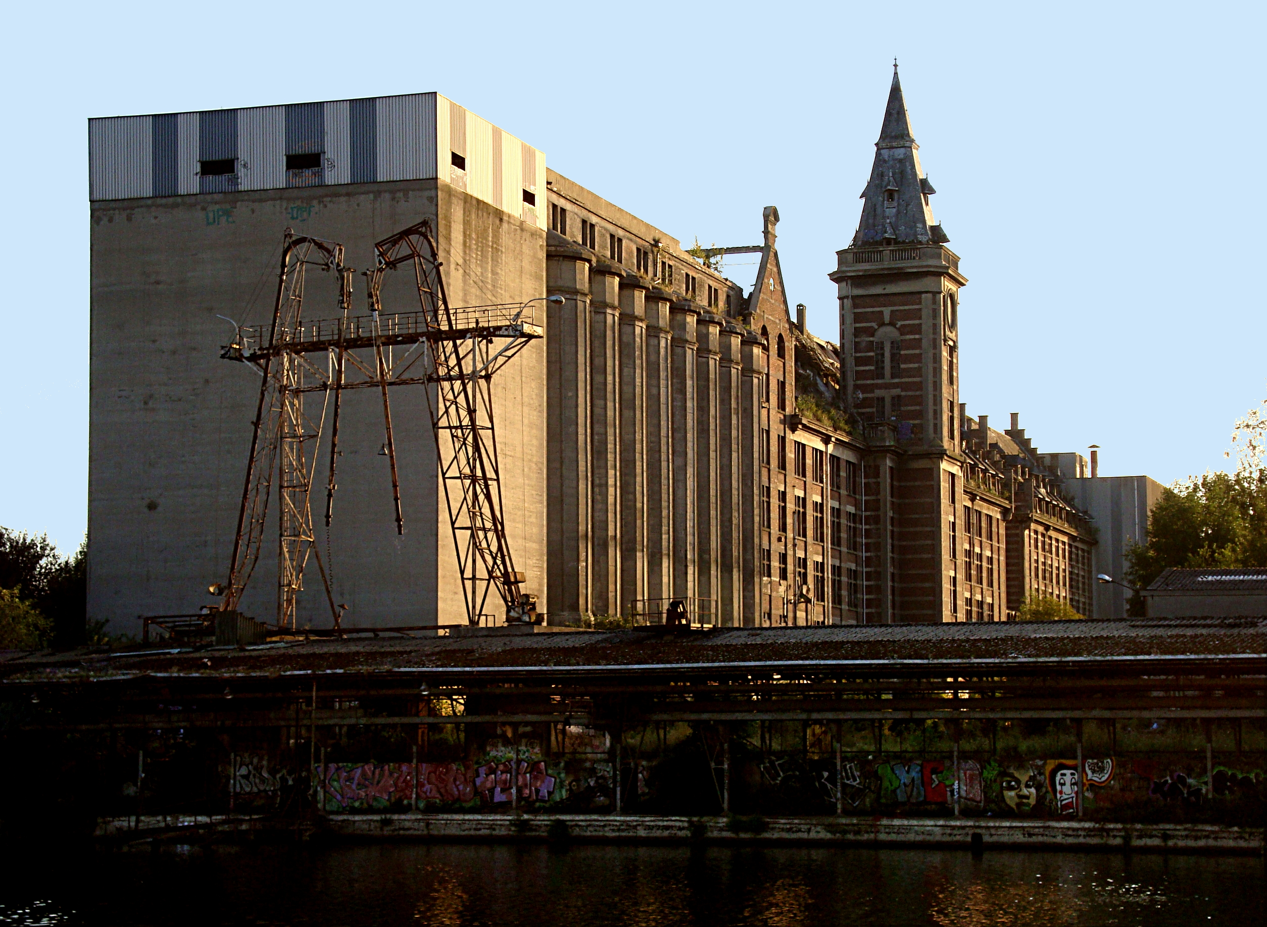 Les Grands Moulins de Paris à Marquette lez Lille (Nord).